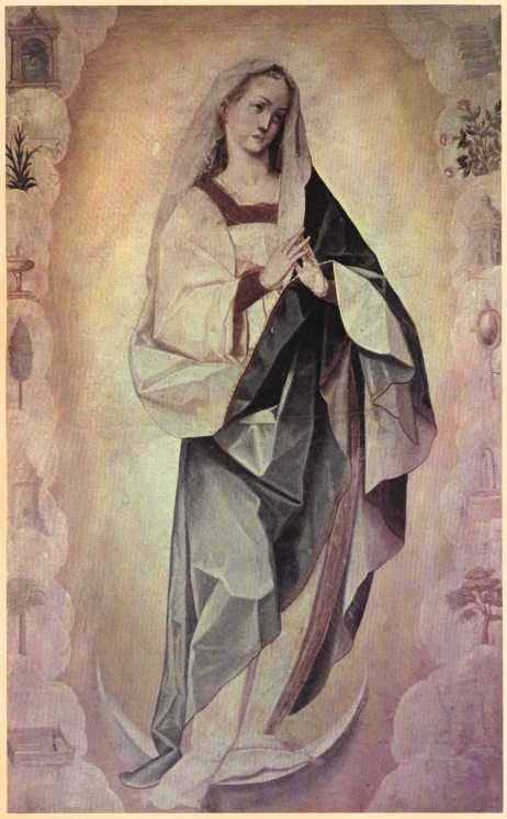 Inmaculada Concepción